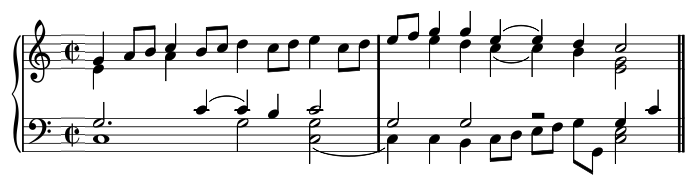 Premières mesures de la pièce Anonyme n° 247 du Fitzwilliam Virginal Book.